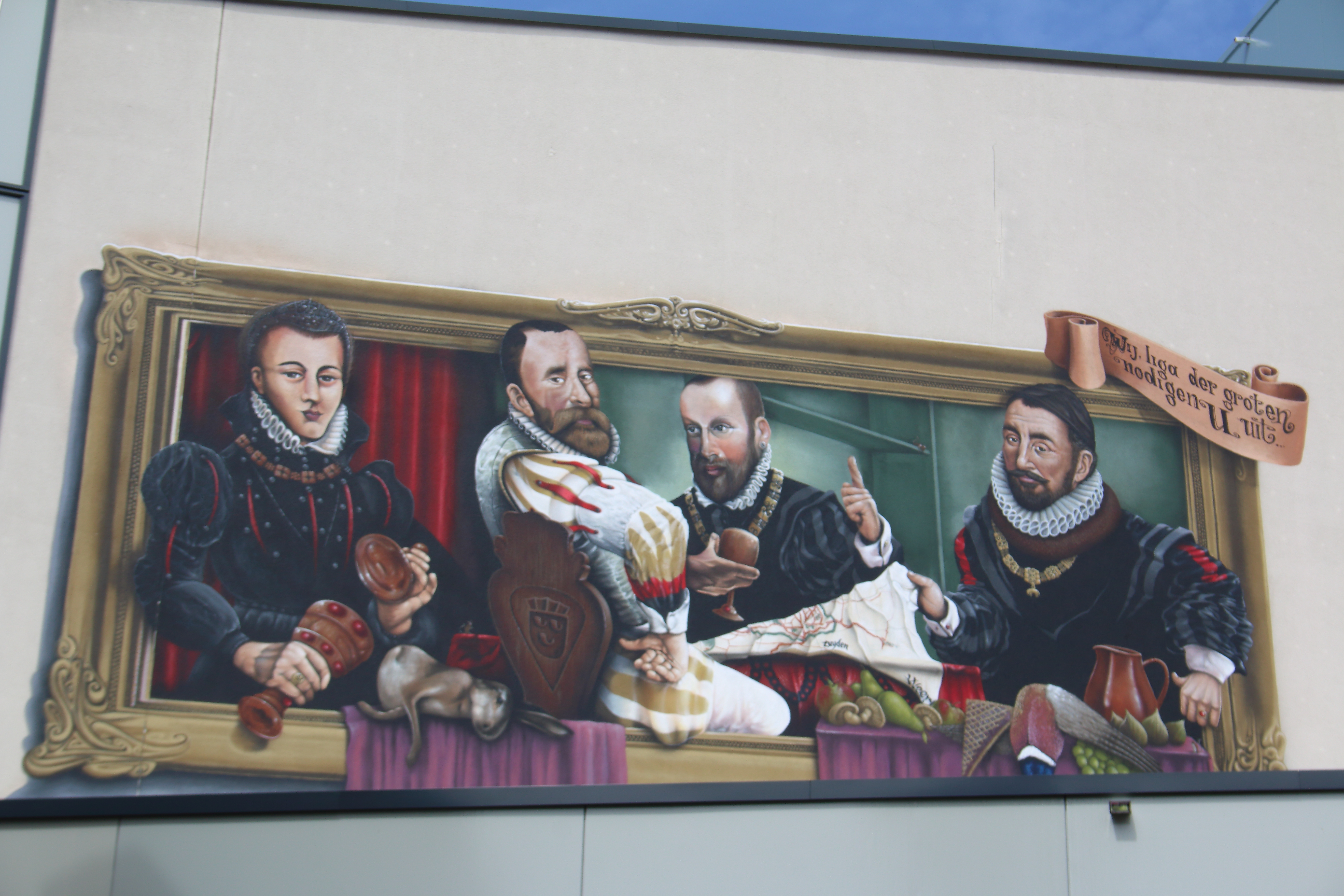 Muurschildering 'Bourgondische heren', Weert, Limburg, Nederland (afgebeeld: Walburgis van Nieuwenaar, Philips van Horne/Montmorency, Lamoraal van Egmont, Willem van Oranje)